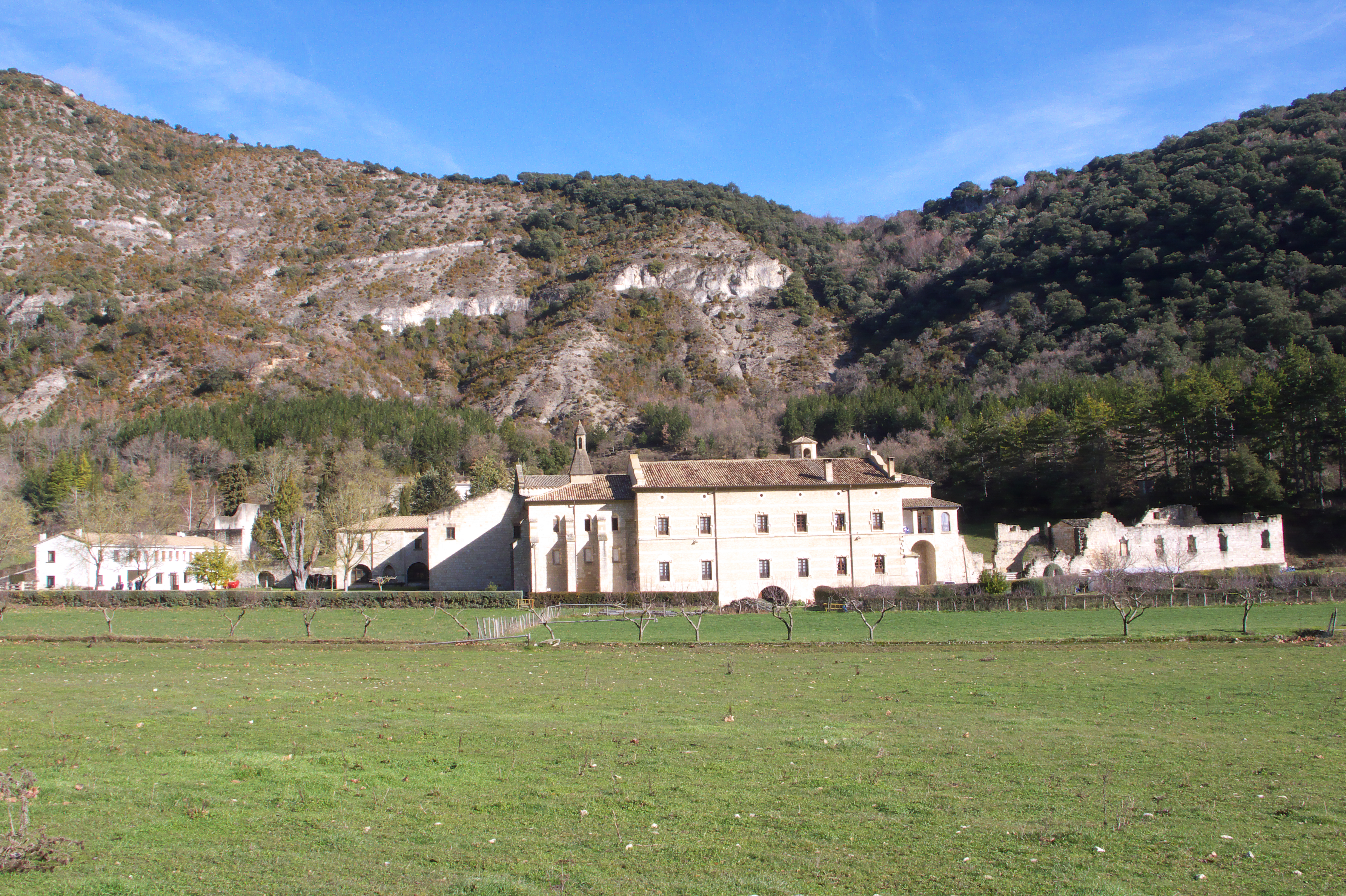 Vista general del monasterio